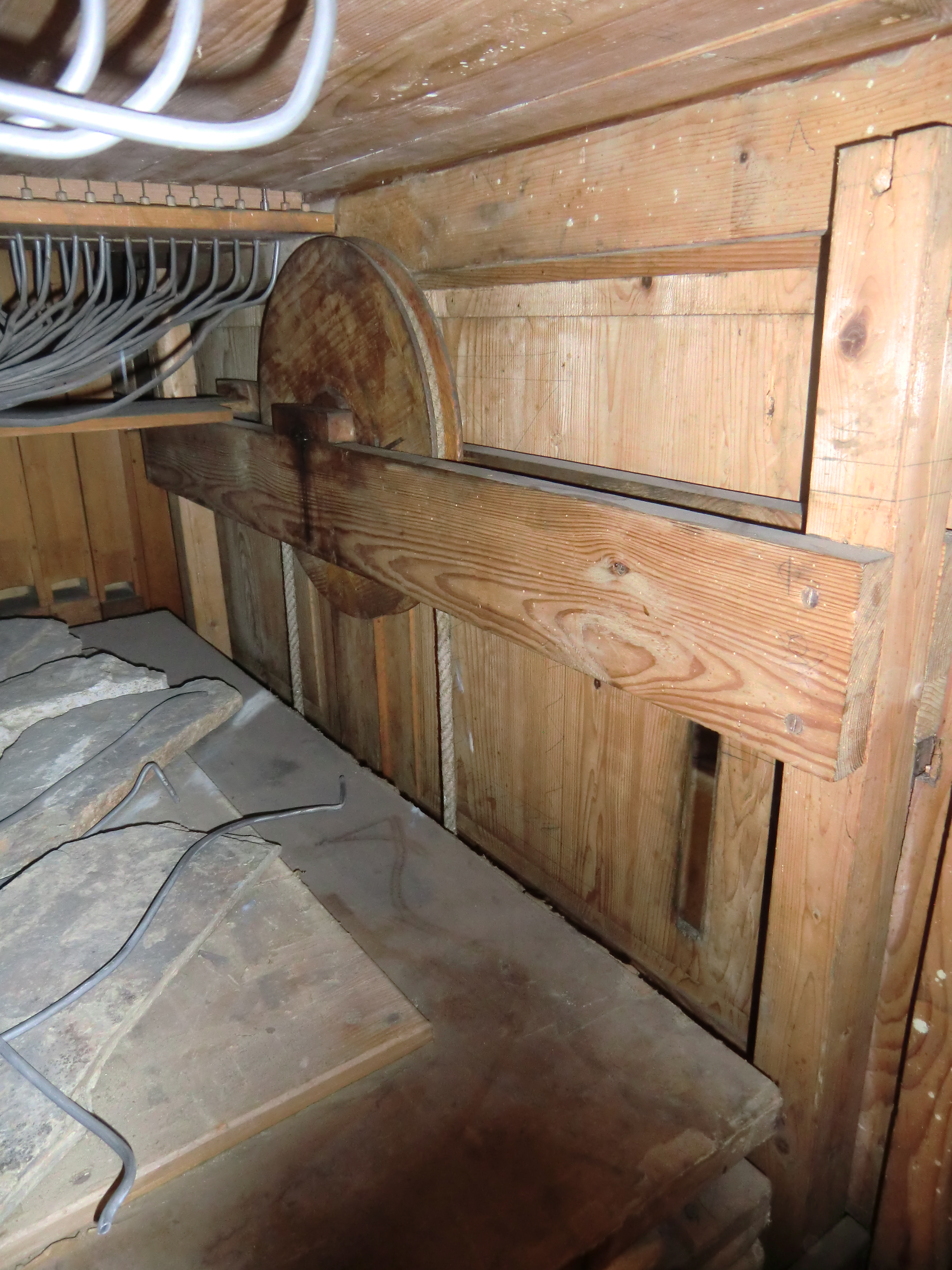 Horn-Orgel in Ransel (1912) - Rollvorrichtung Kalkantentritte